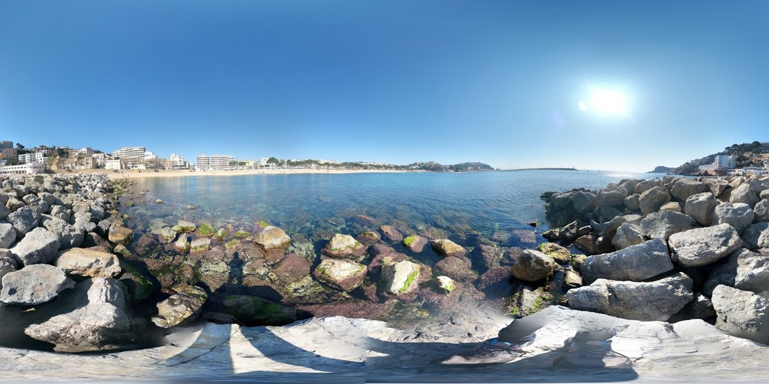 Platja de Sant Feliu (Sant Feliu de Guíxols). This is a a photo of a beach in Catalonia, Spain, with id: PL-CT-17003-266